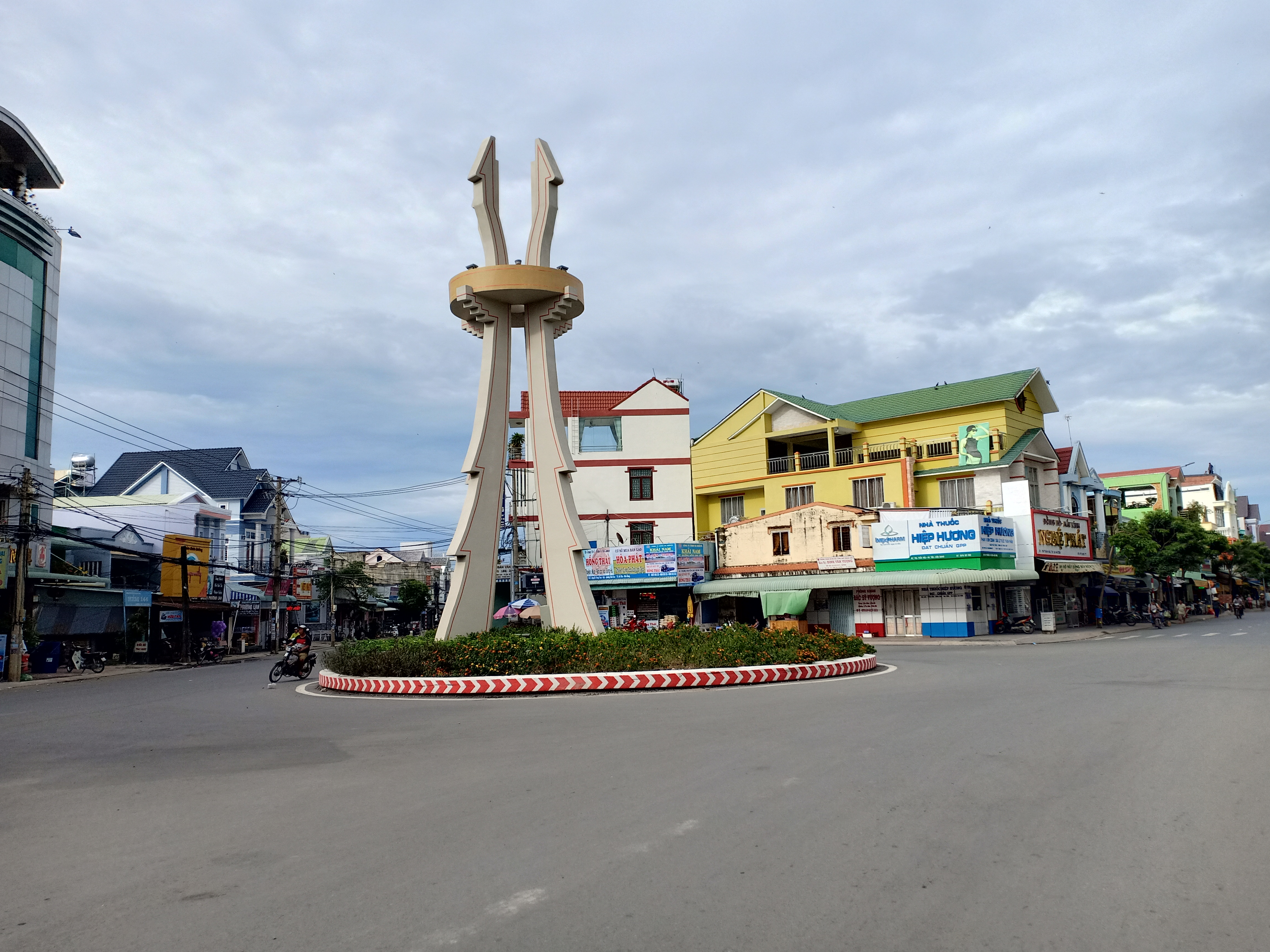 Trung tâm Thương mại Hà Tiên: Nơi đây du khách có thể tìm mua các sản phẩm đặc trưng của địa phương như: Khô, tiêu, mắm, các hải sản tươi (ghẹ, tôm, mực, cá, ốc), … hay các mặt hàng được nhập khẩu từ Campuchia (dầu gió, sầu riêng Kampot, đường thốt nốt,…) và từ Thái Lan (quần áo, giầy, dép, sữa tắm, măng cụt, bòn bon,…). - Chợ đêm Hà Tiên, nằm phía sau Chợ Bách hóa Hà Tiên, với hơn 120 hộ tham gia gian hàng. Chợ đêm bắt đầu mở từ 18 giờ - 22 giờ mỗi đêm. Tại đây du khách có thể trải nghiệm một đêm ở lại tham quan Hà Tiên, đi dạo dưới tiết trời mát mẻ, mua sắm đồ lưu niệm hay có thể thưởng thức các món ăn, thức uống đặc trưng của địa phương.